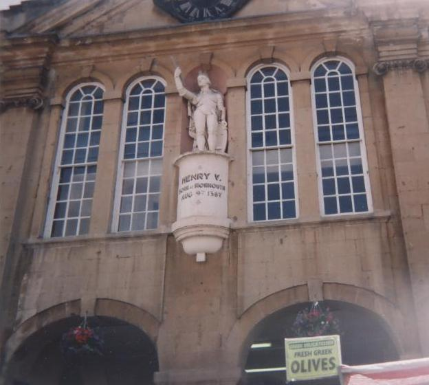 Estàtua d'Enric V d'Anglaterra a Monwouth, el seu poble natal.